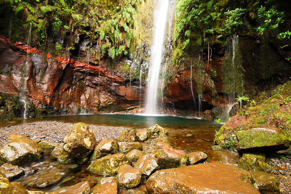 Endstation der beliebten Levada-Wanderung "25 Fontes". Hier ergießen sich 25 Quellen in zahlreichen kleineren und einem großen Wasserfall.